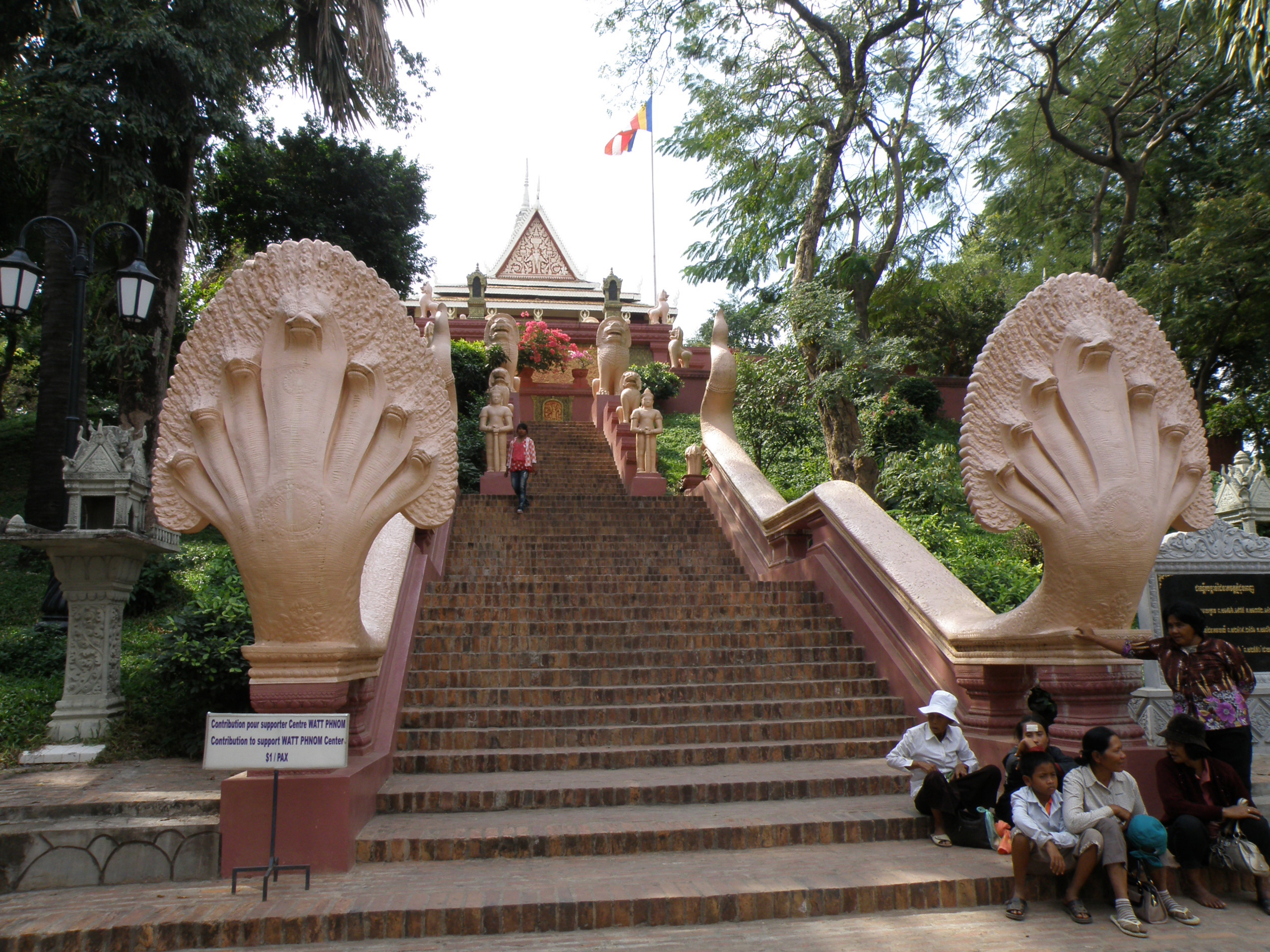 Cambodge - Phnom Penh - Nagas au pied du Wat Phnom Penh au centre de la capitale